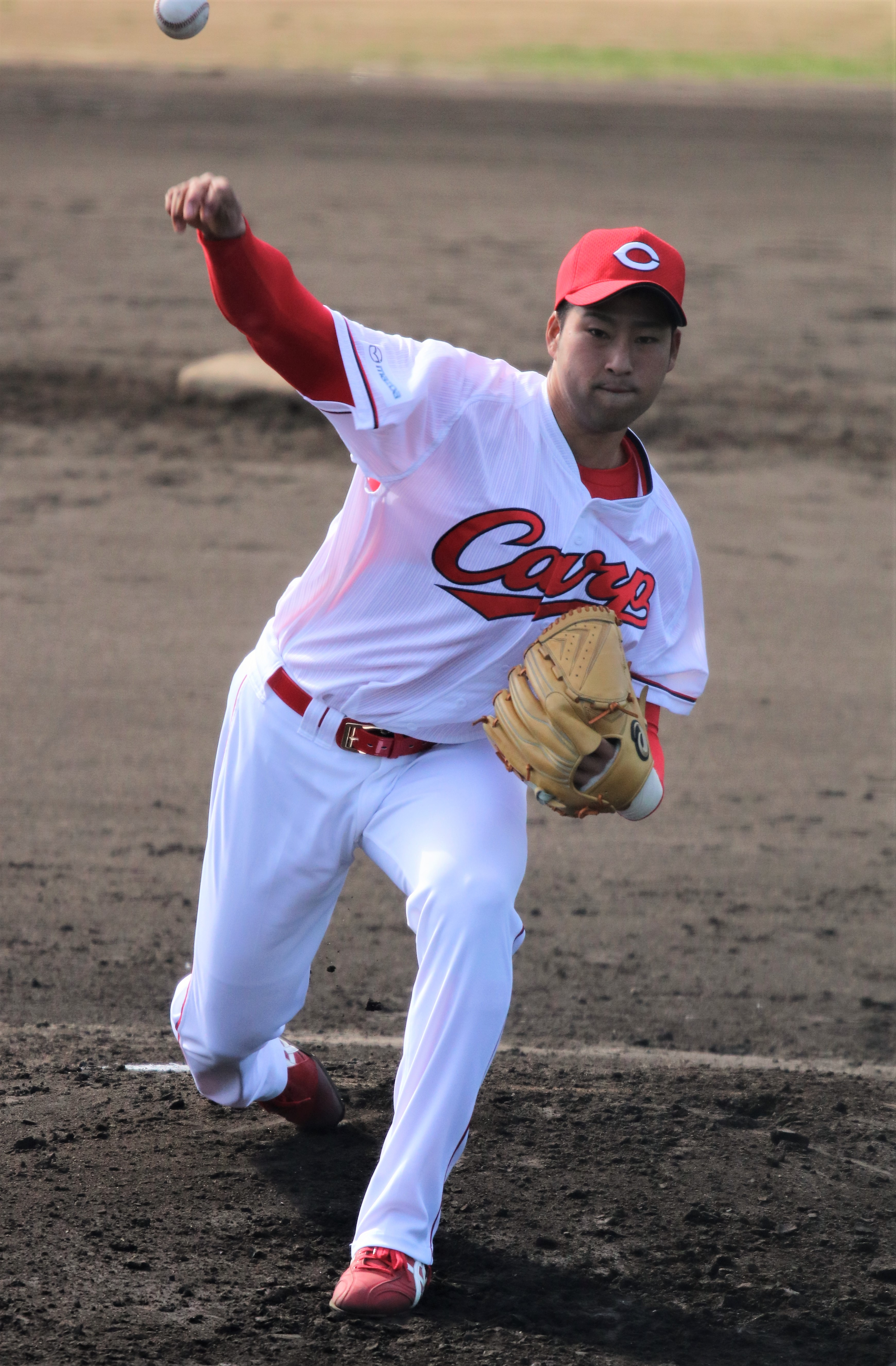 2018/2/8 春季キャンプ(東光寺球場)